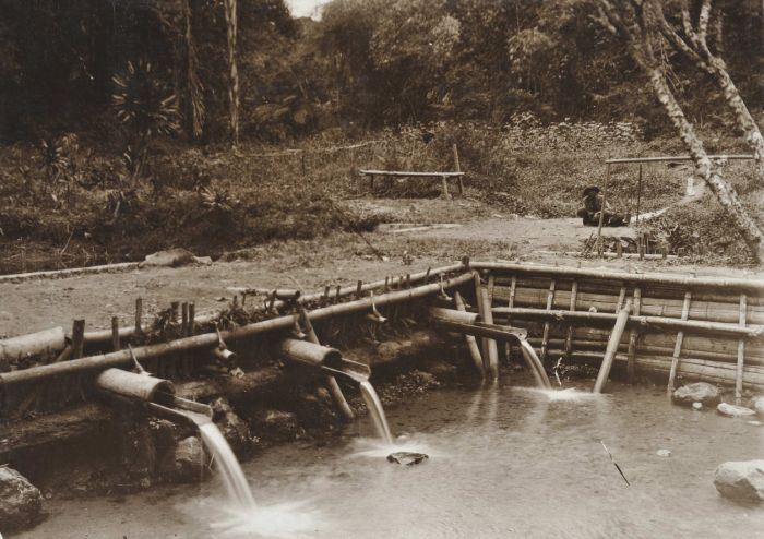 Foto. Badplaats Petjeren, Karo-Hoogvlakte, Sumatra`s Oostkust